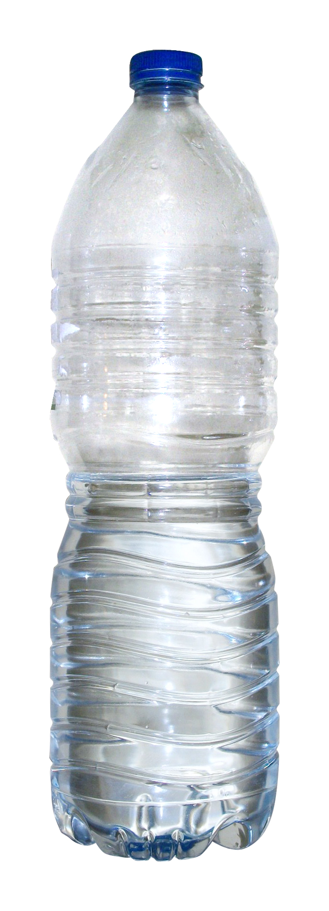 Botella de agua medio llena o medio vacia